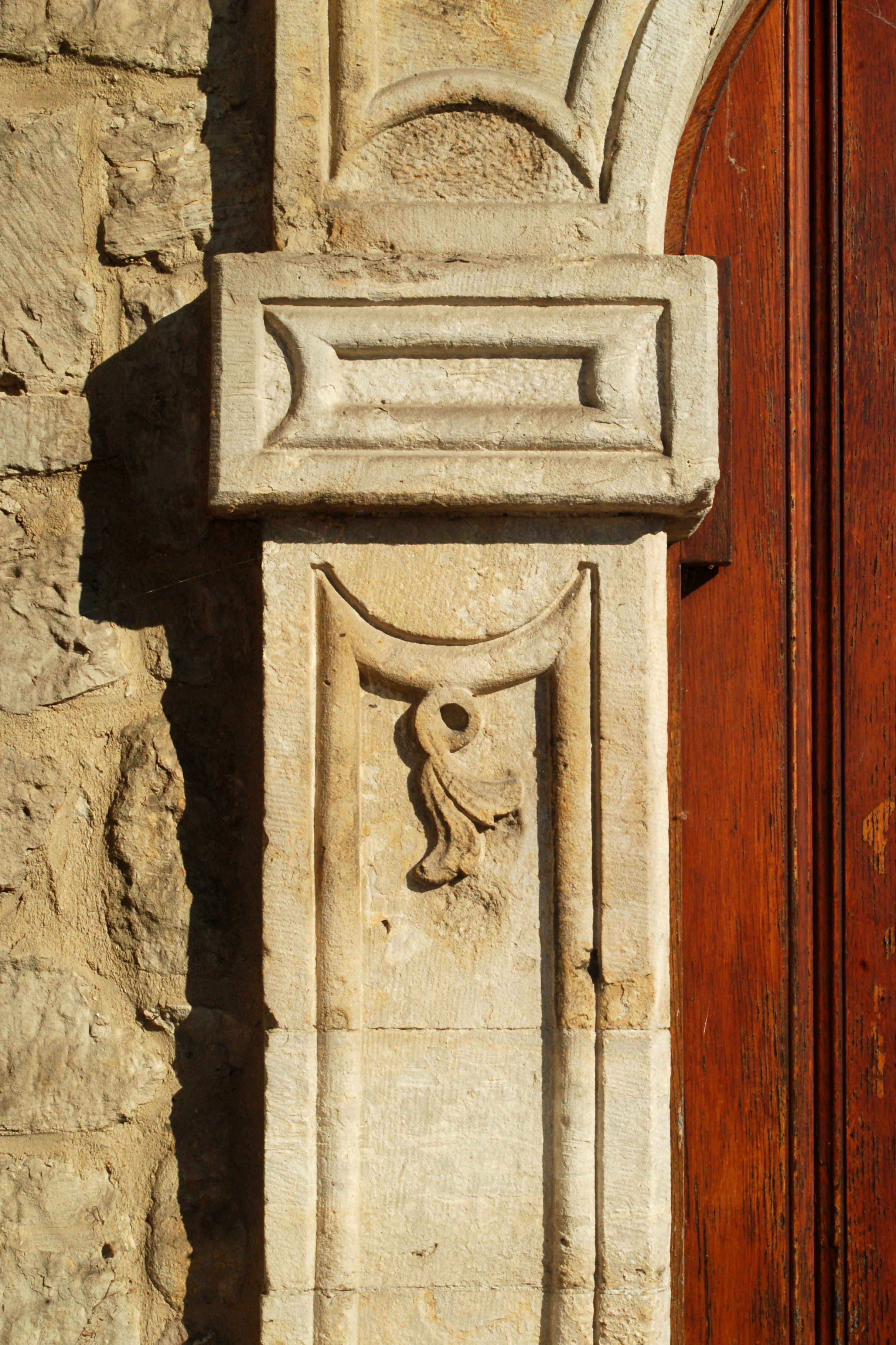 Belgique - Brabant wallon - Jodoigne - Saint-Remy-Geest - Église Saint-Remy